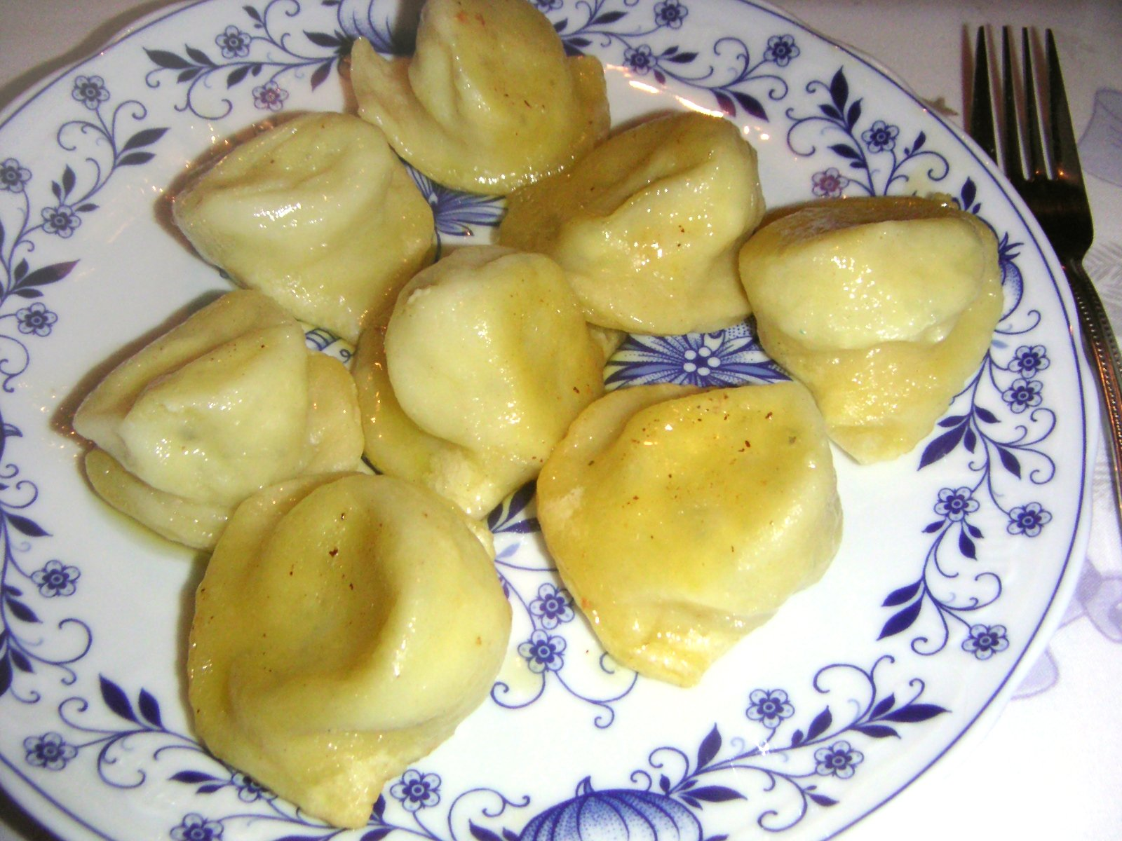 Kärntner Nudeln, (Kasnudeln)